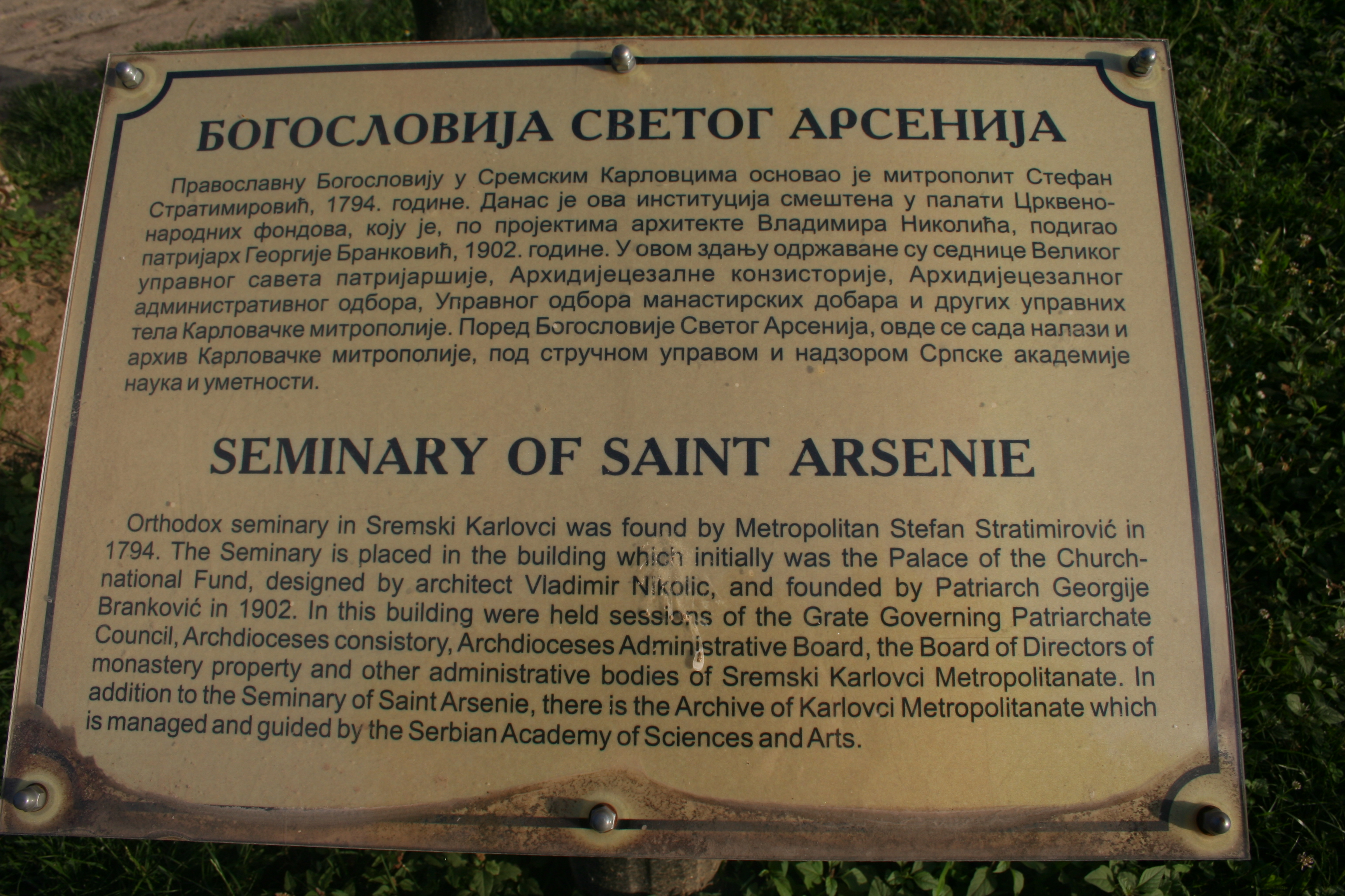 Karlovačka bogoslovija Sv. Arsenije